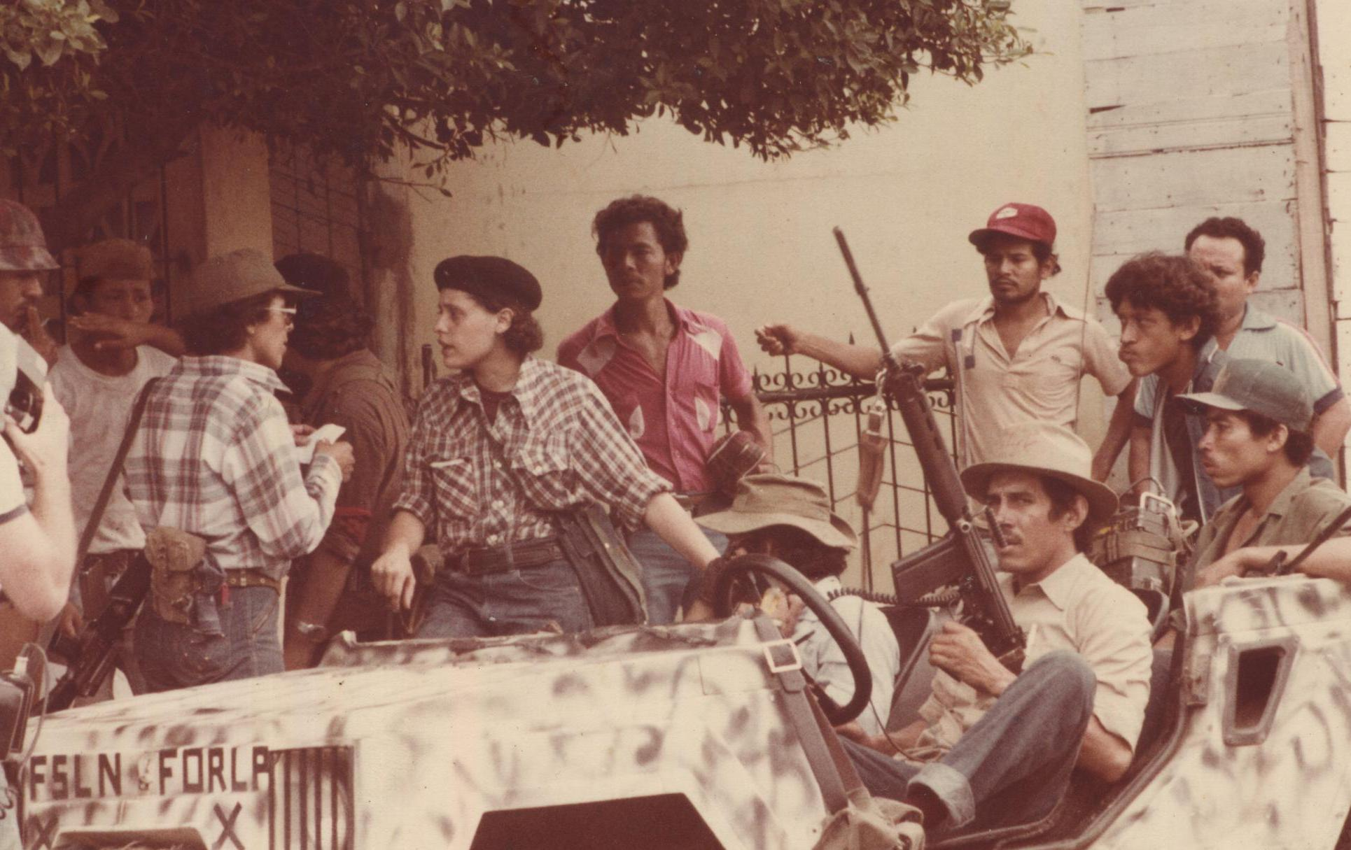 Leticia Herrera, Dora María, Fanor Urroz (Mariano) y El Gato. Junio 1979. Insurrección de León 1979 Imágenes de las acciones militares durante la insurrección de León y de la destrucción causada por los bombardeos de la Fuerza Aérea Nicaragüense (FAN) de la GN. durante los meses de junio y julio de 1979